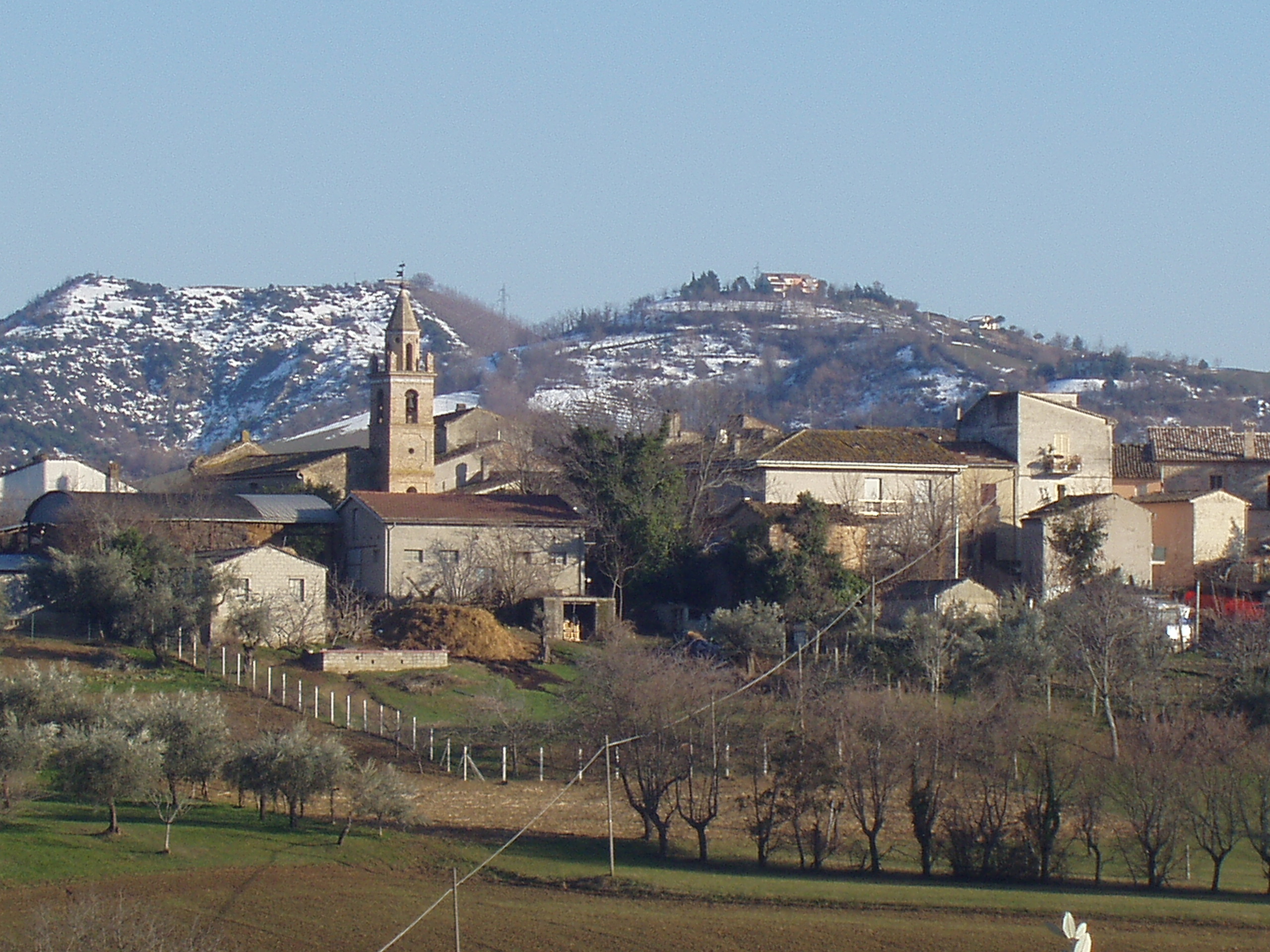 Cavuccio